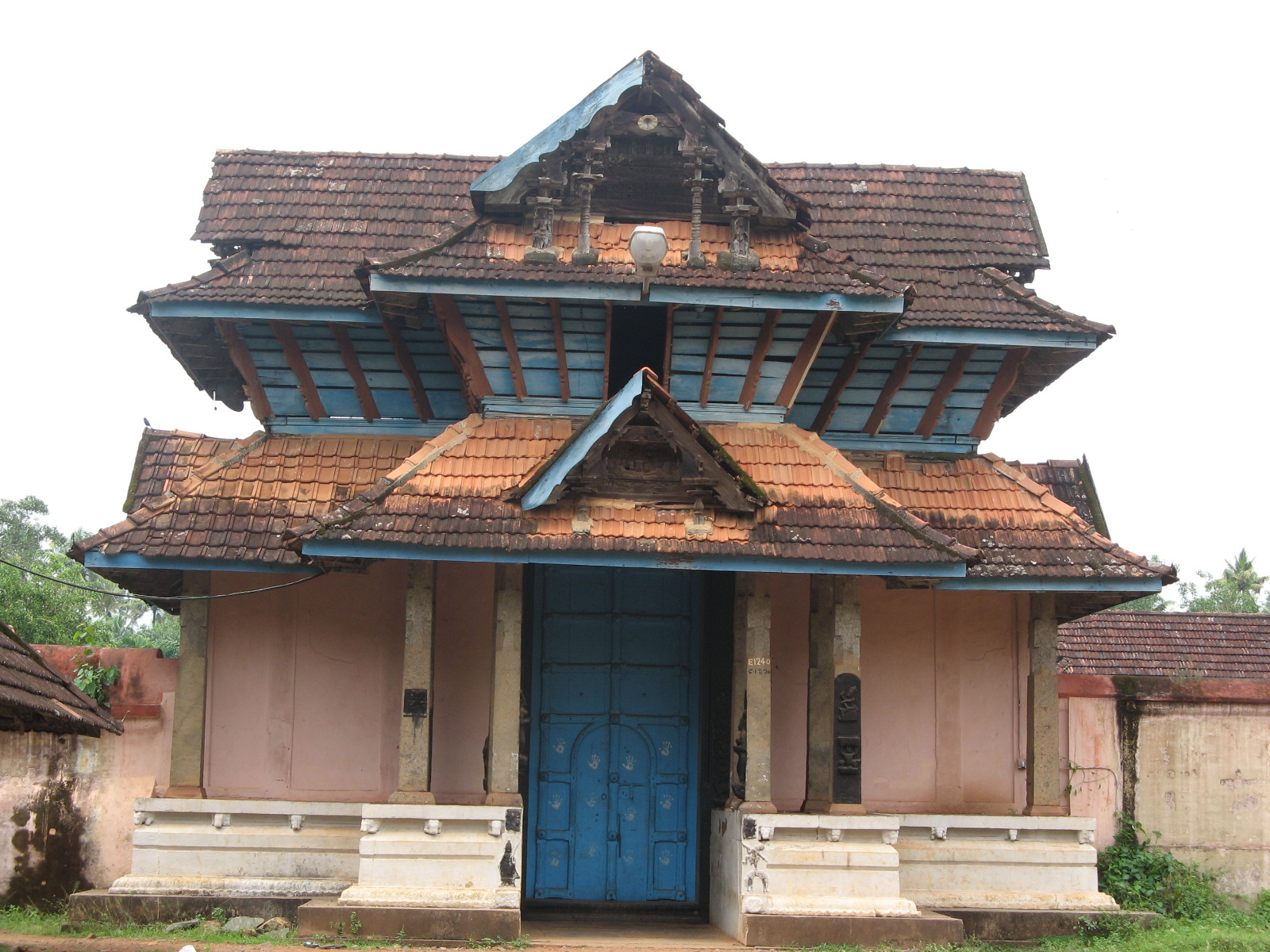 അന്നമനട മഹാദേവക്ഷേത്രം-കിഴക്കേ ഗോപുരവാതിൽ